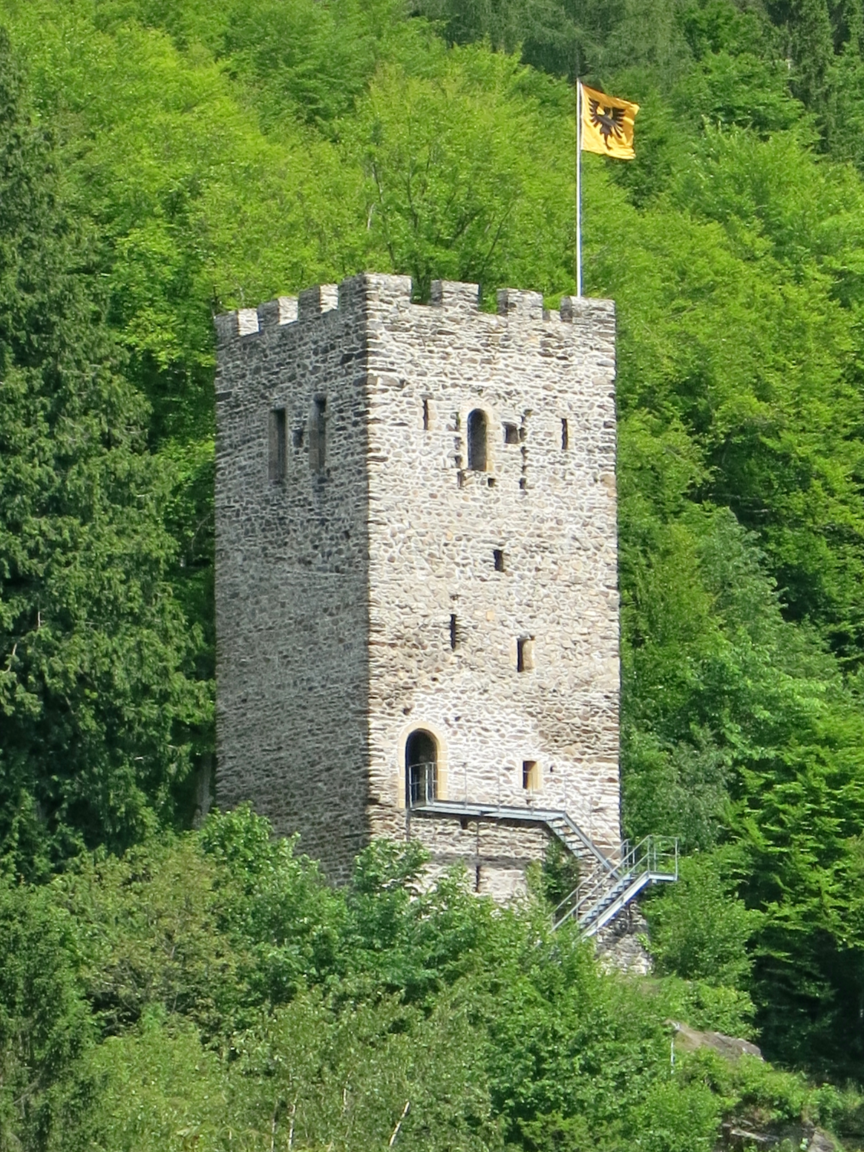 Restiturm